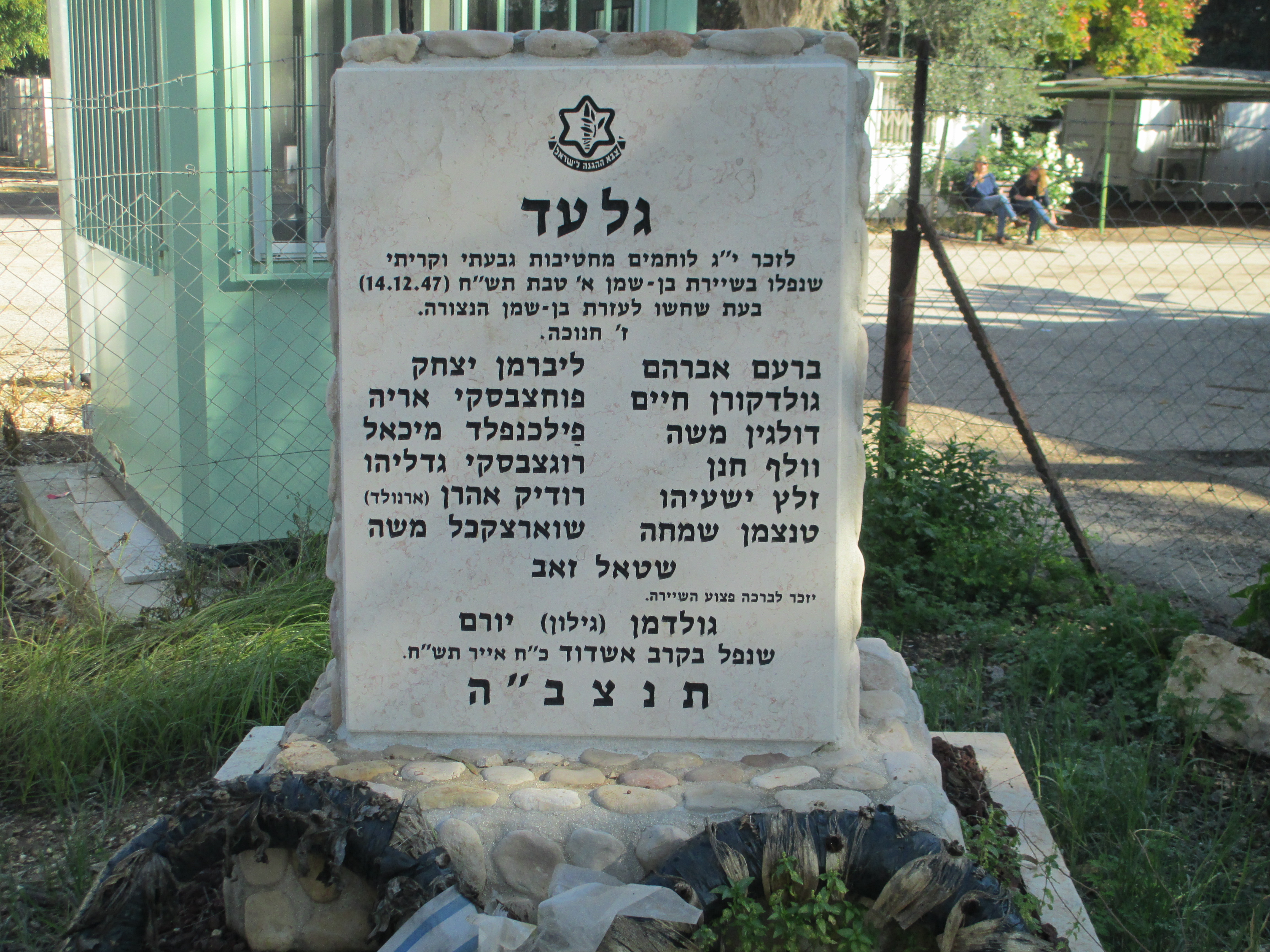 גלעד לנופלים בשיירת בן שמן